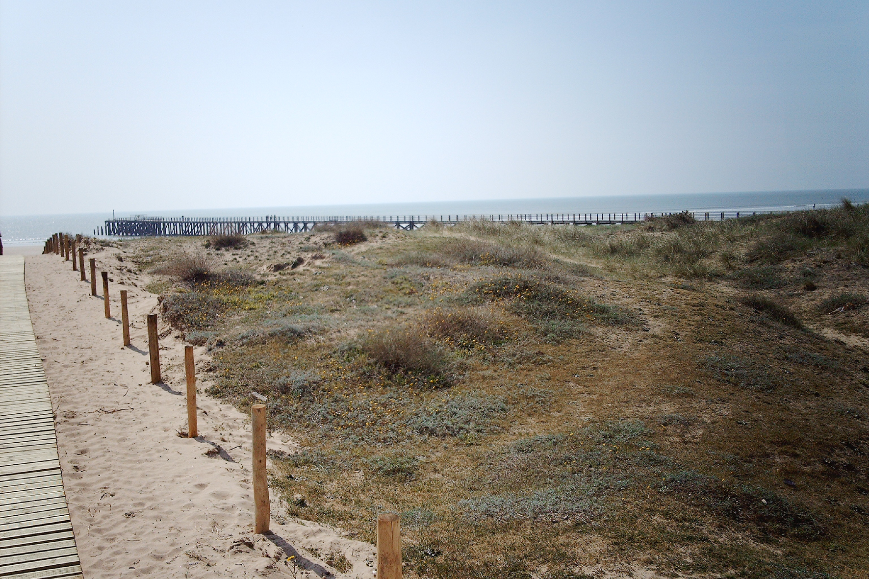 Entrée jetée à Saint-Jean-de-Monts.